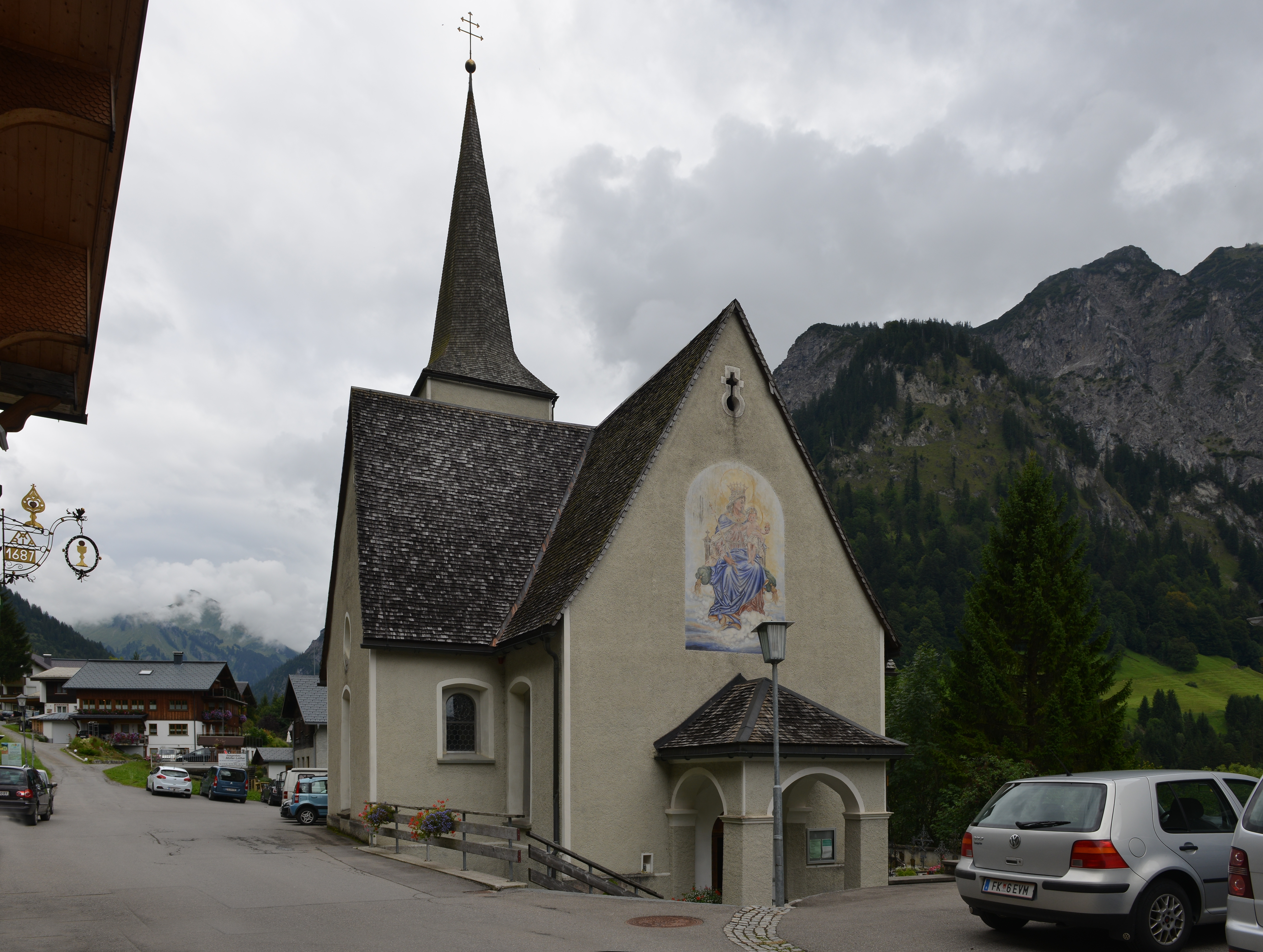 aus dem DEHIO Vorarlberg 1983: Buchbodner Pfarrkirche unserer lieben Frauen Mariä Gebut: Hochaltar, bez. 1761 (aus Bürs, 1903 aufgestellt); Viersäulen-Baldachinaufbau mit Voluntenaufsatz auf geschwungenem Grundriß mit reichem Rocailledekor; anstelle des Gemäldes Figur Immaculata (aus Hörbranz), Oberbild Guter Hirte, von Anton Jehly; 1903, Figuren unter Baldachin li. hl.Anna, re. hl. Josef von Gebhard Moosbrugger, 1903-1905; Gebälkengel und Putten, Johann Ladner zugeschrieben, 1761. - Tabernakel mir Rocailledekor, 1761.